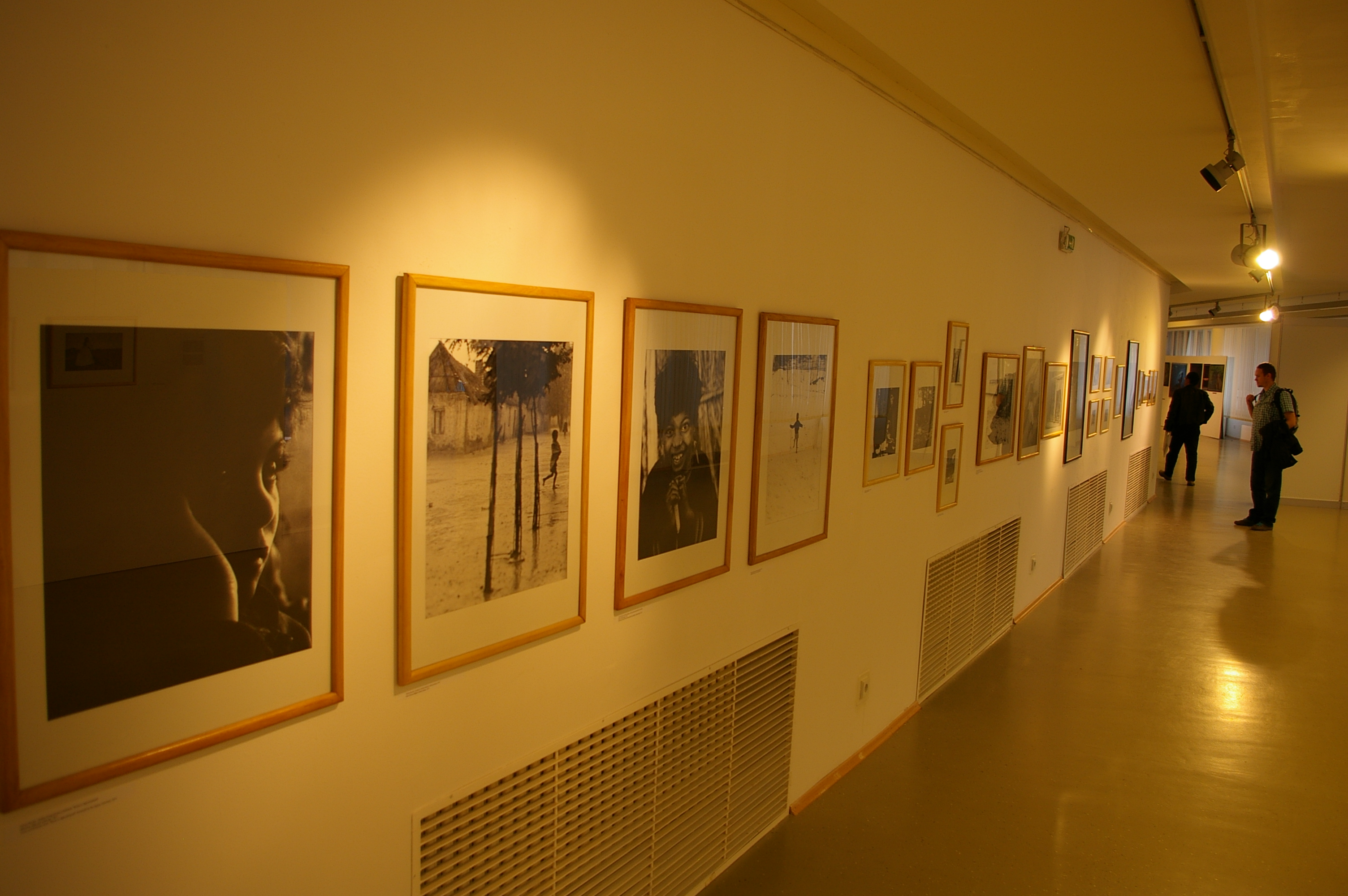 Mesiac fotografie Bratislava 2013 Na cestě